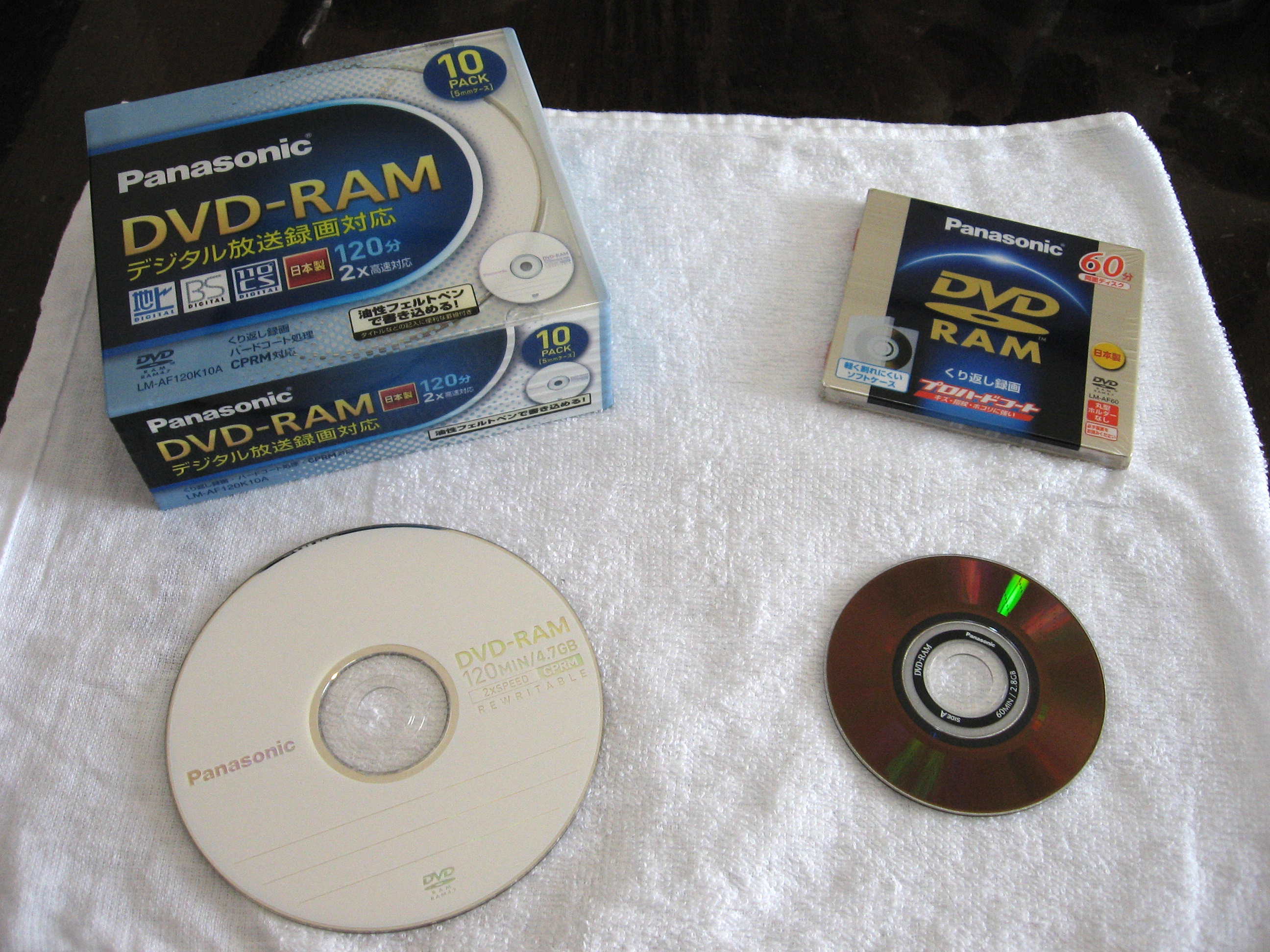 投稿者自身が買い置きのDVD-RAMを撮影。 写真は、いずれも松下電器産業から発売されている製品です。 左：LM-AF120K10A （12cm／デッキ用） 右：LM-AF60 （8cm／カムコーダ用）